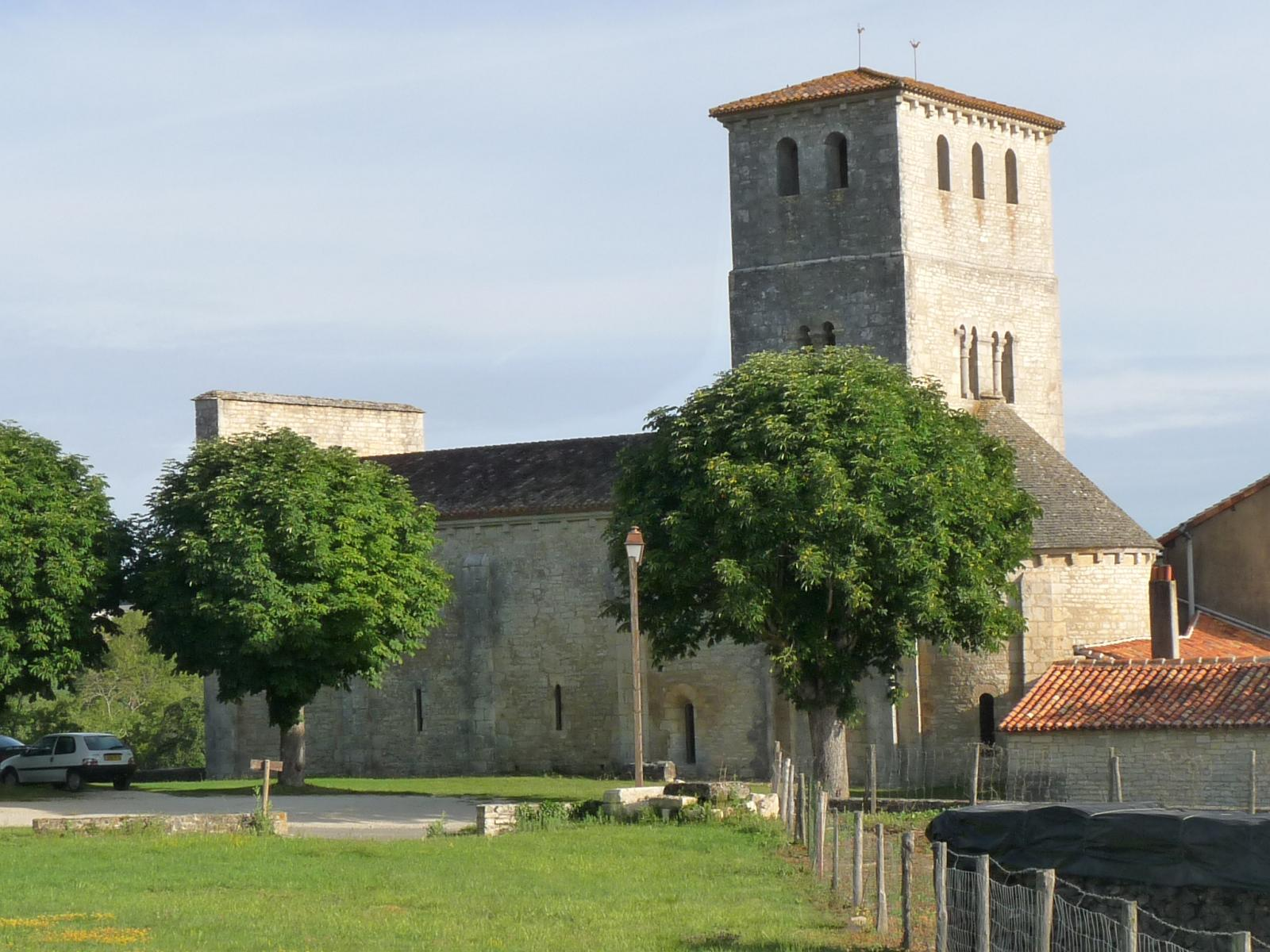 église de Coulgens, Charente, France